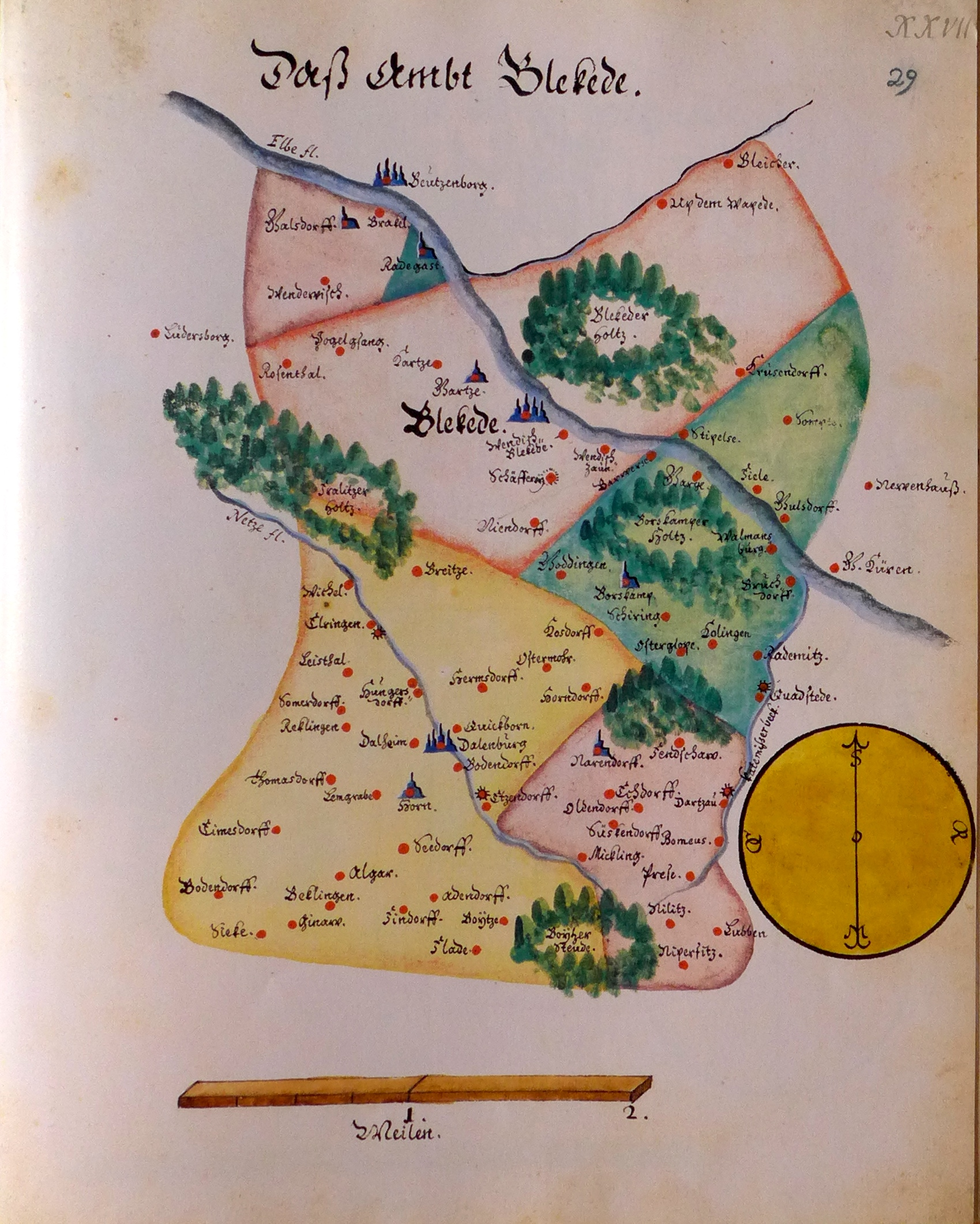 Ämteratlas des Fürstentums Lüneburg von Johannes Mellinger, um 1600 – Reproduktion der im Niedersächsischen Landesarchiv, Abteilung Hannover, lagernden Kopie um 1678 (vgl.